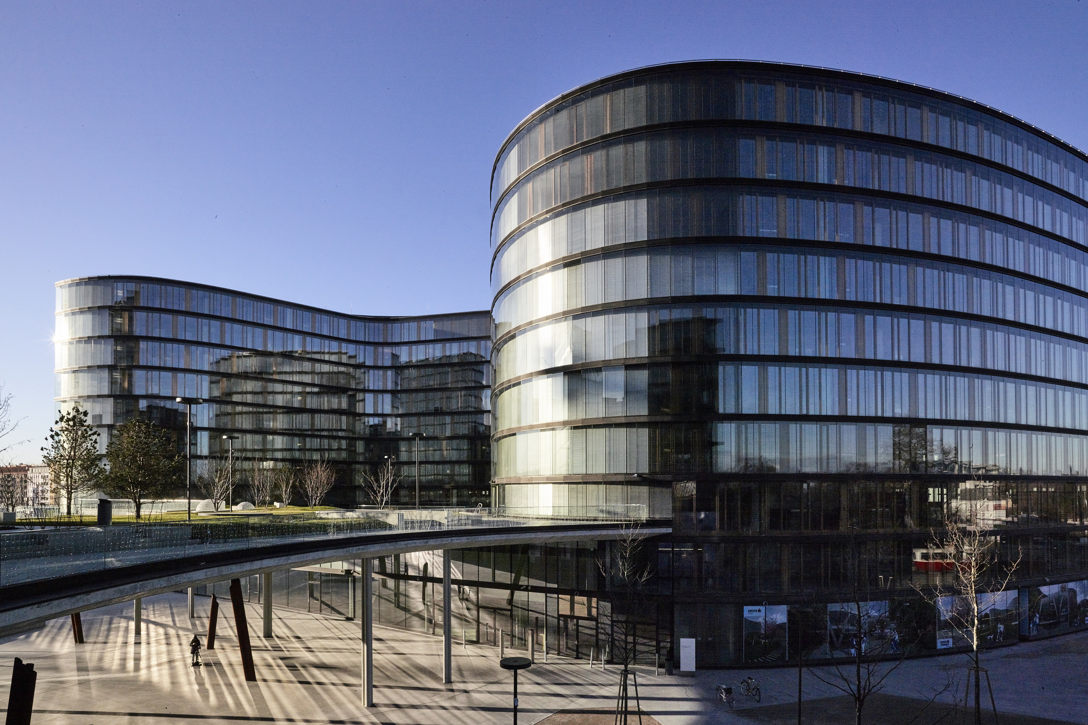 Erste Campus in Wien